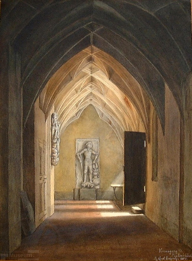 Kreuzgang der Augustinerkirche in Leipzig mit der Grabplatte des Nickel Pflugk, 1889 (Aquarell üb. Bleistift)